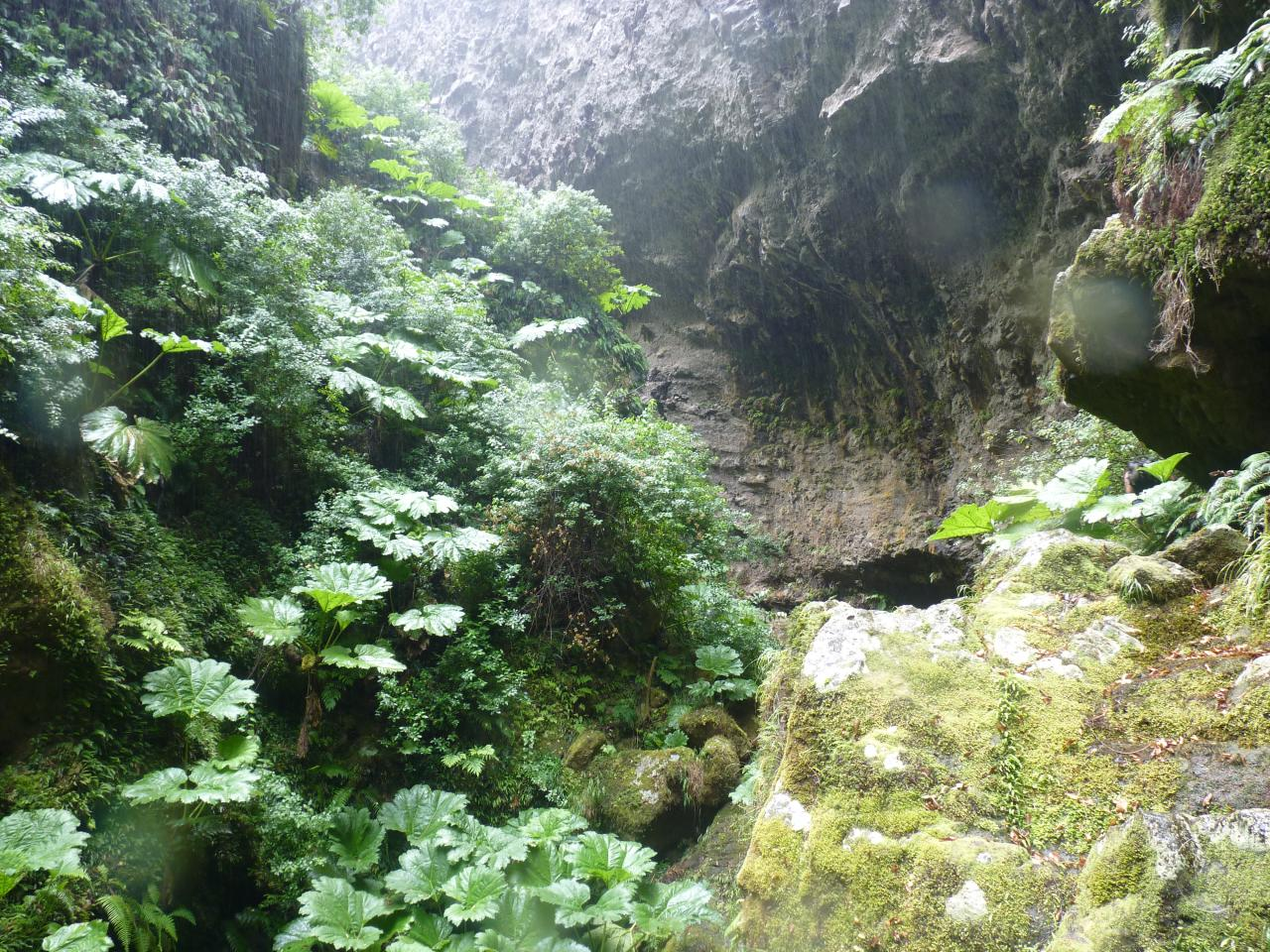 Quebrada Las Casas, Alejandro Selkirk Island.